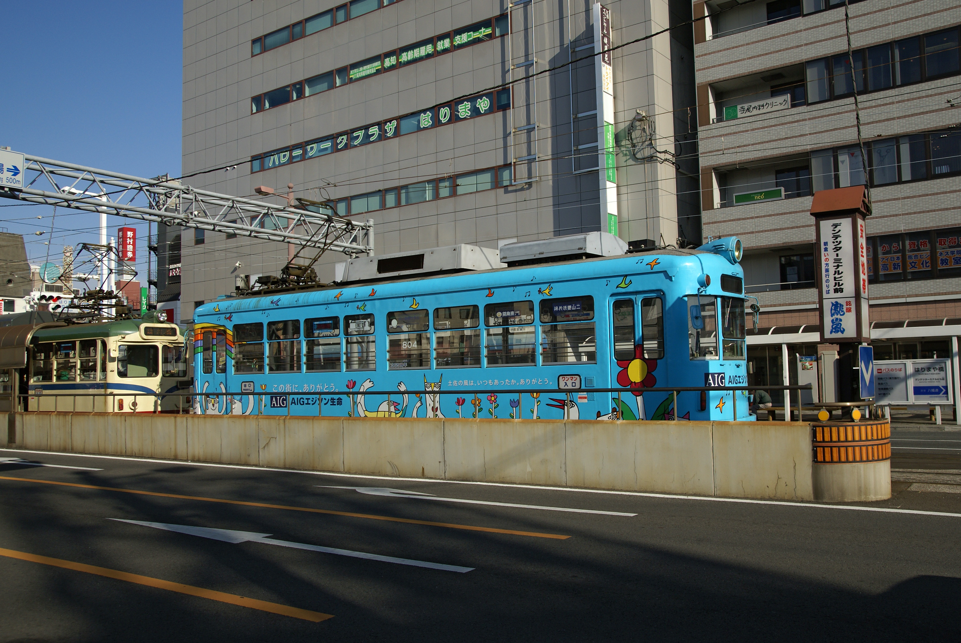 Dentetsu-Tāminarubiru-mae Station in Kōchi, Kōchi Prefecture, Japan